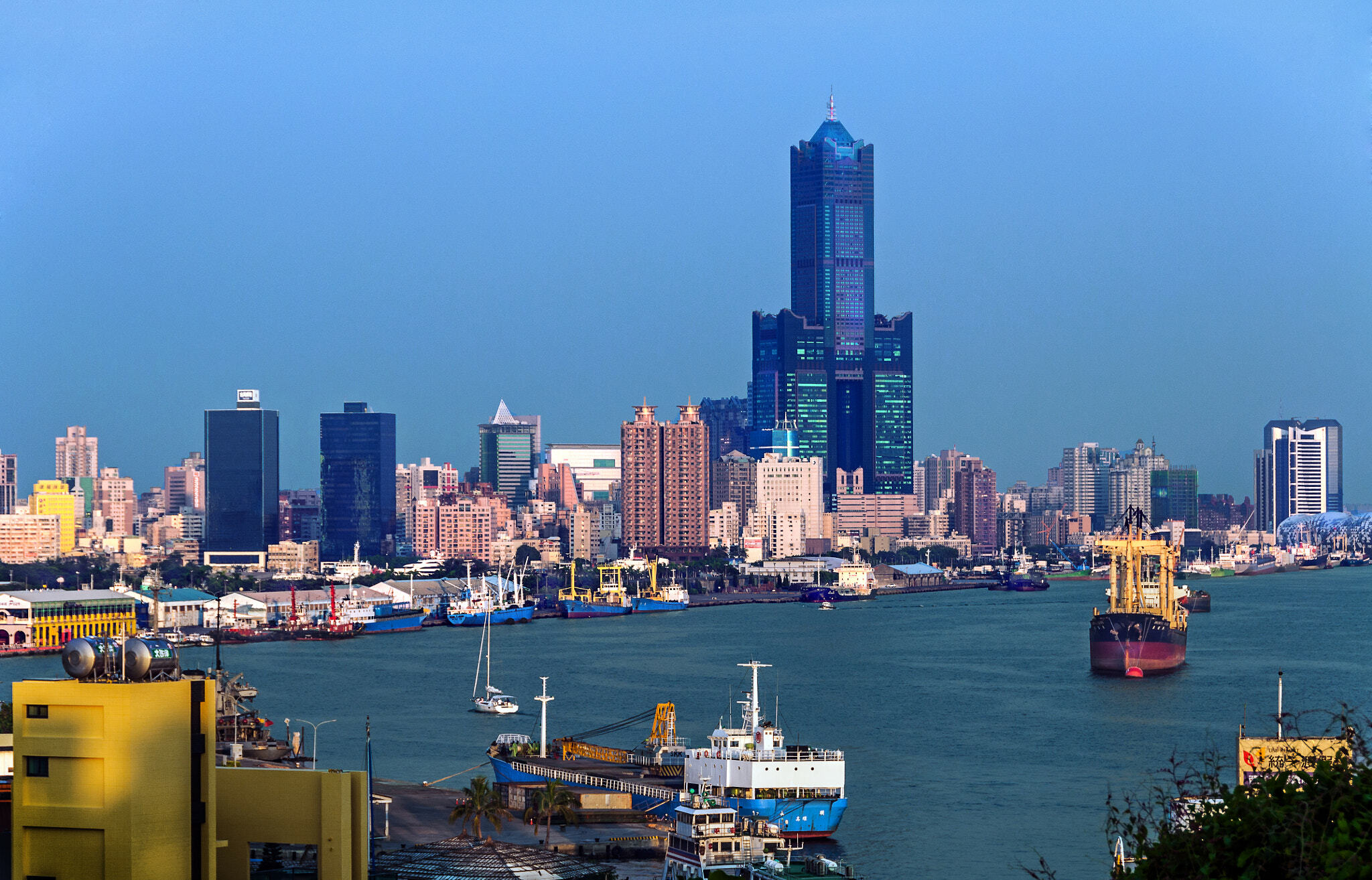 高雄港全貌